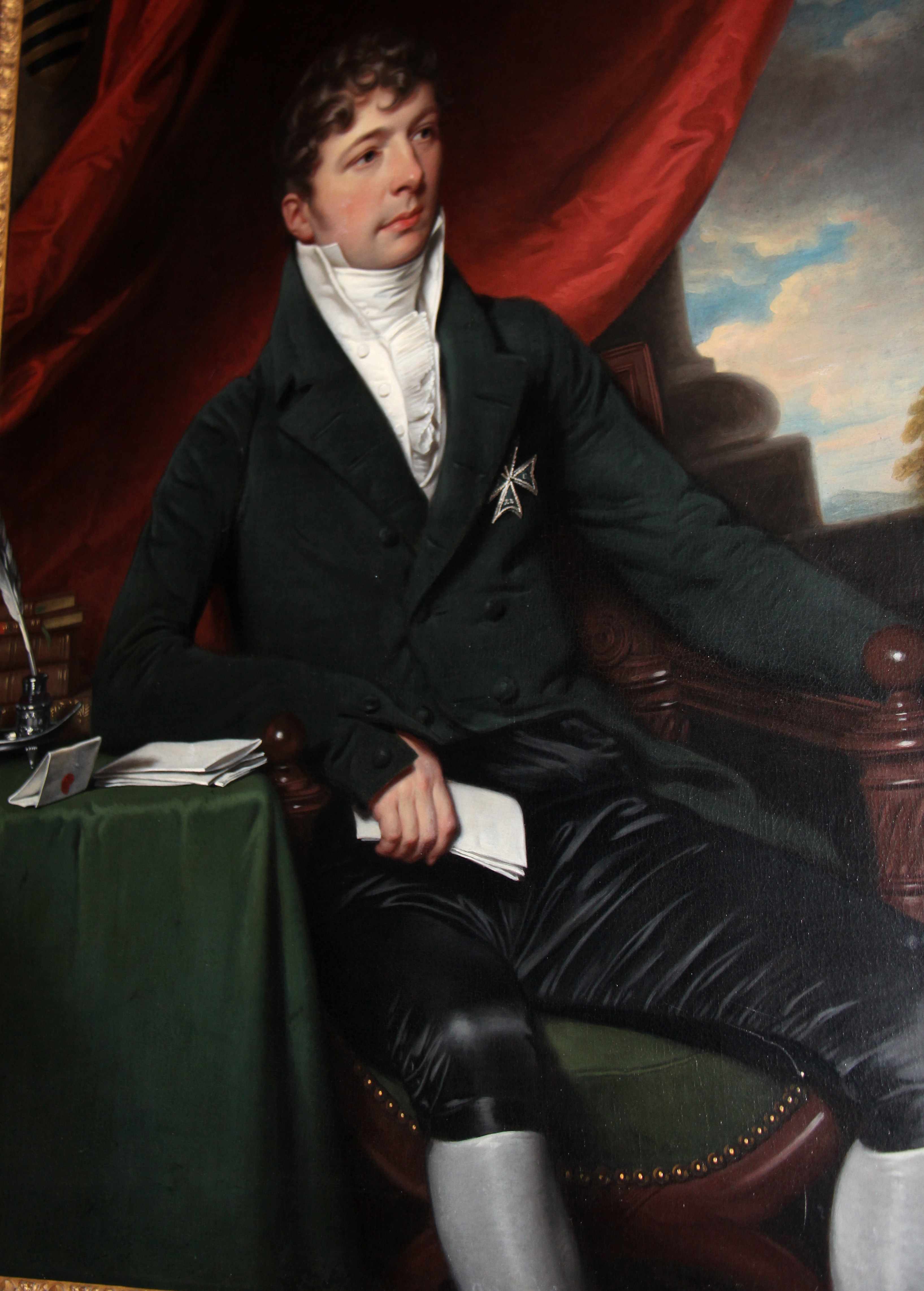 Andries van Pallandt van Eerde als Commandeur in de Orde van de Unie, geportretteerd door C. W. Hodges.